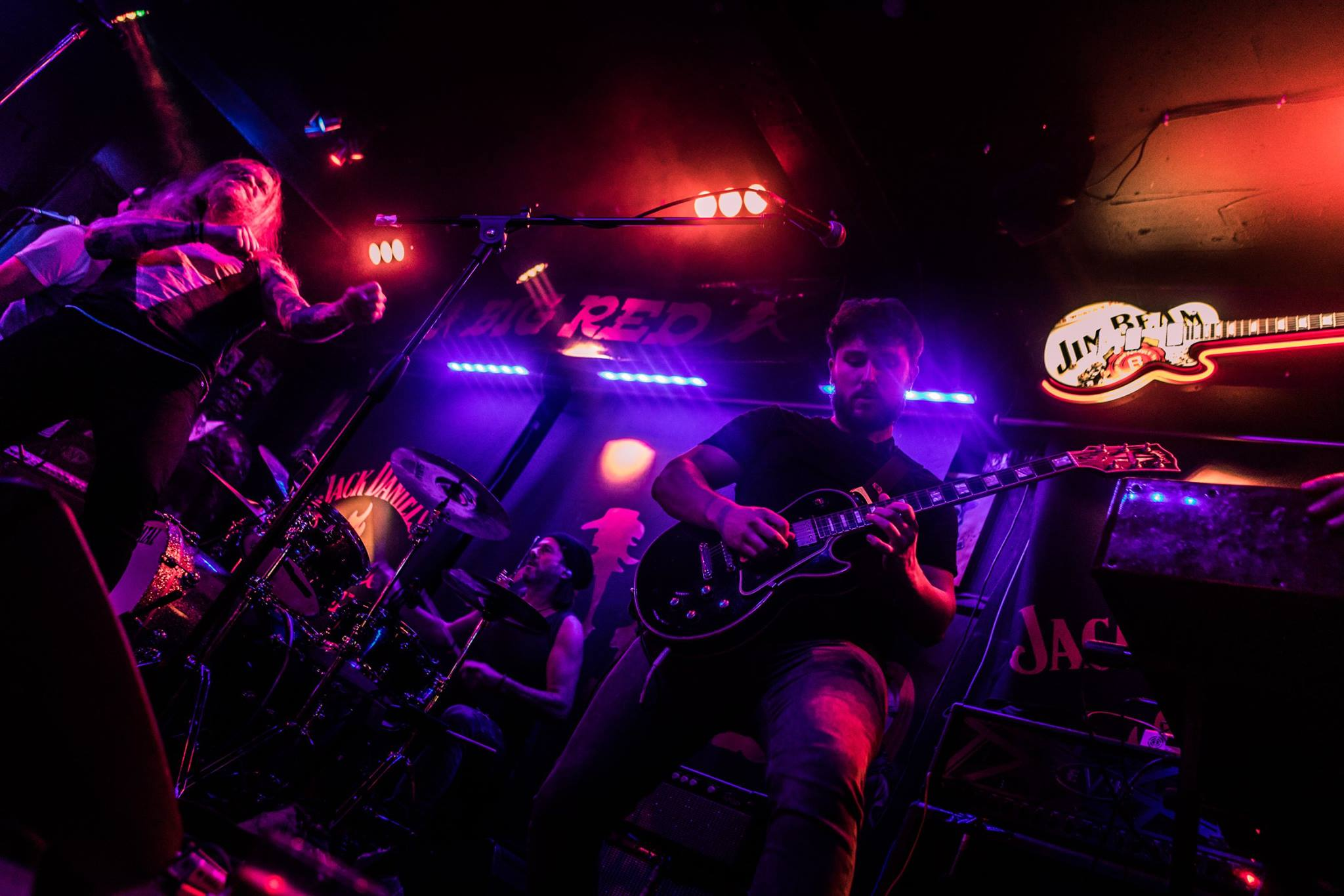 5th Avenue im Big Red in London